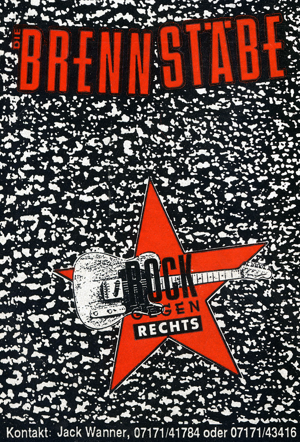 Bandplakat der Gruppe "Die Brennstäbe, Rock Gegen Rechts"